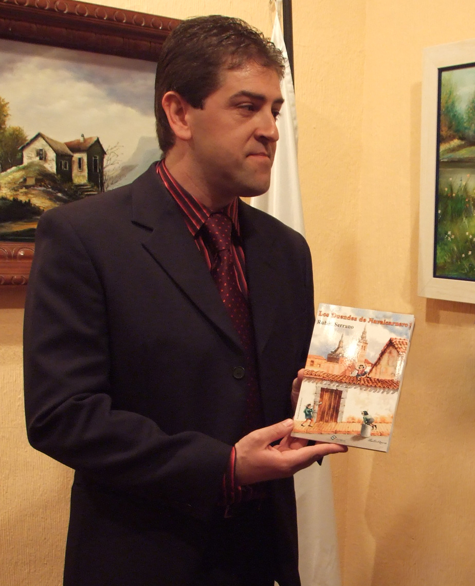 Ruben Serrano